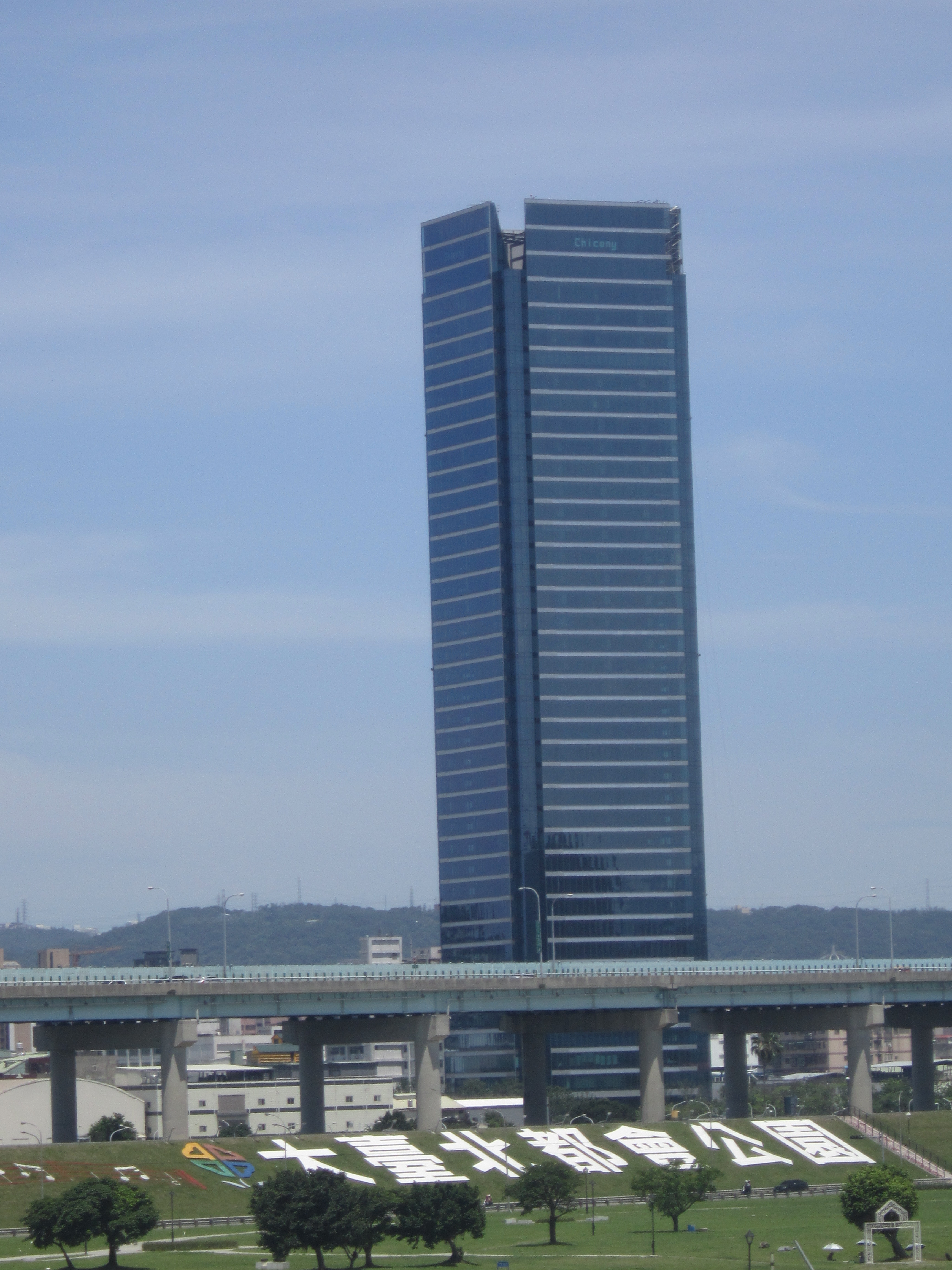 中文（台灣）: 群光電子總部大樓與大臺北都會公園。